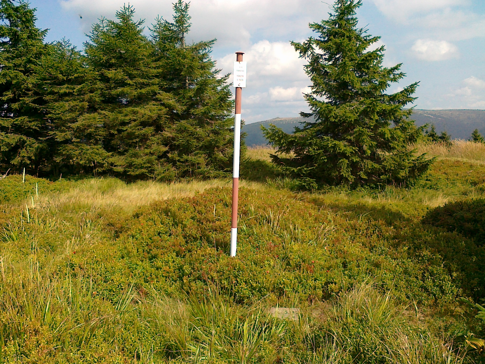 Punkt geodezyjny na górze Vřesník